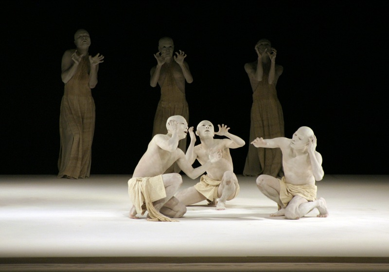 Espectáculo presentado en el Festival Cervantino llamada Kagemi: Más allá de la metáfora de los espejos, Sankai juku pertenece a la segunda generación de los grupos de la danza Butoh, movimiento que emergió en los años setenta como una expresión crítica de la conciencia humana.